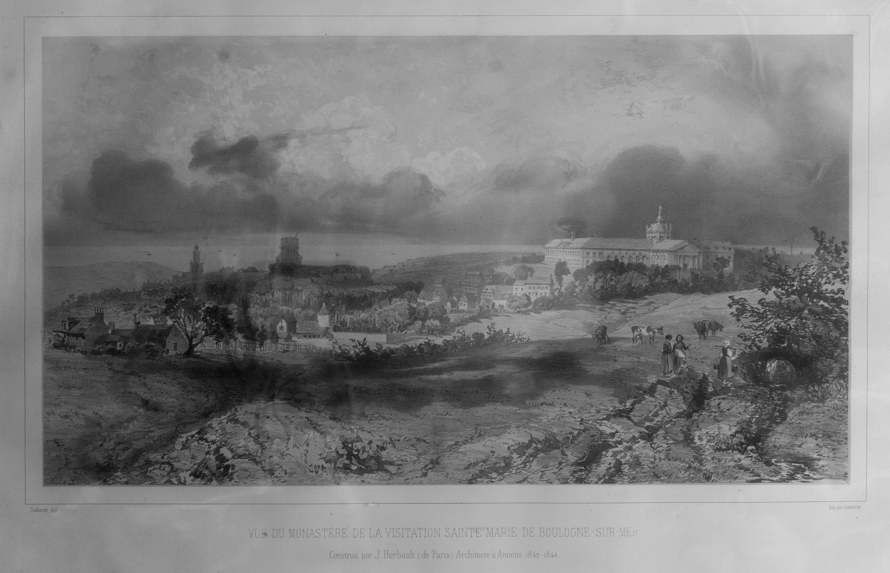 gravure